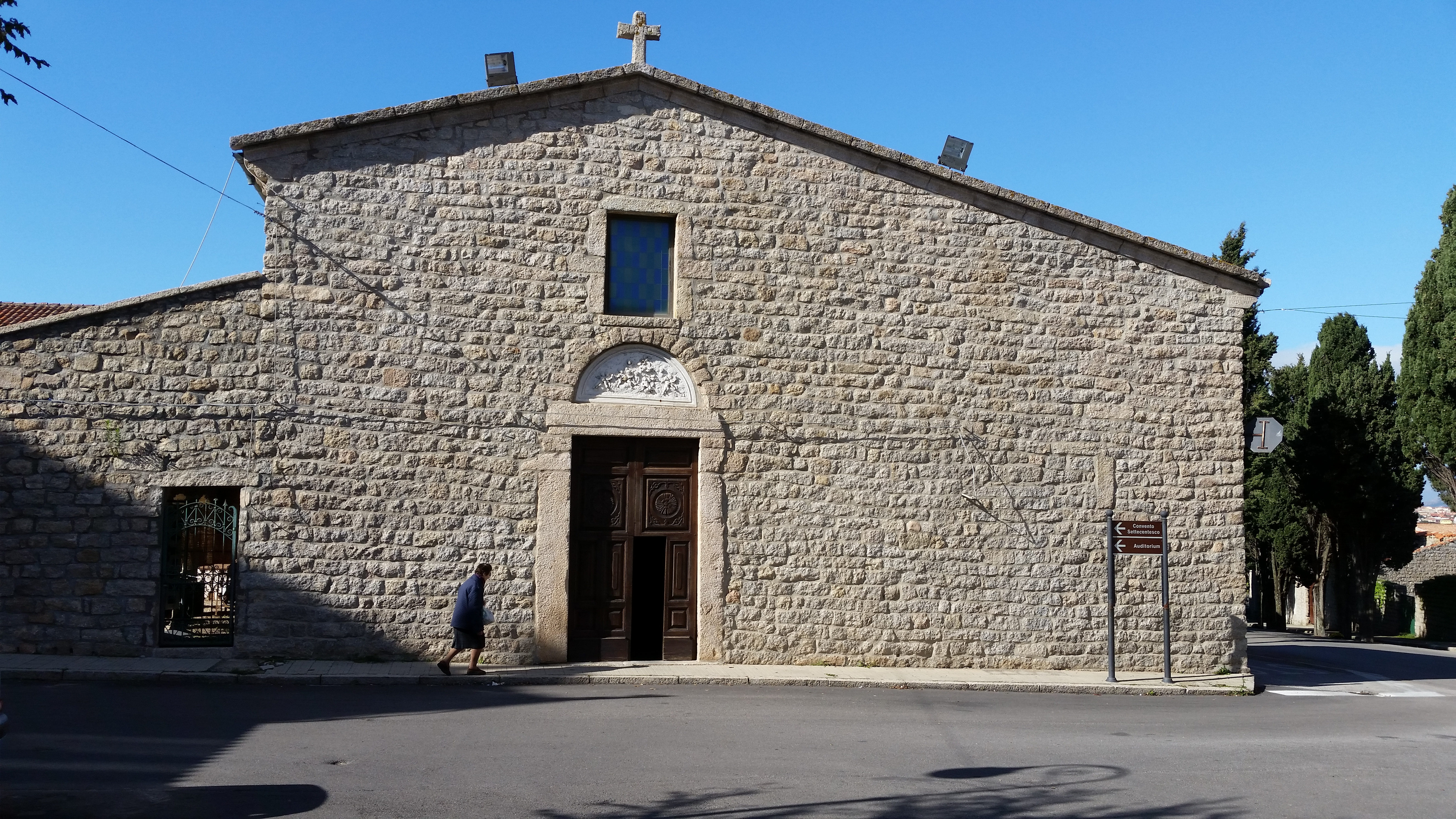 Facciata in granito della Chiesa